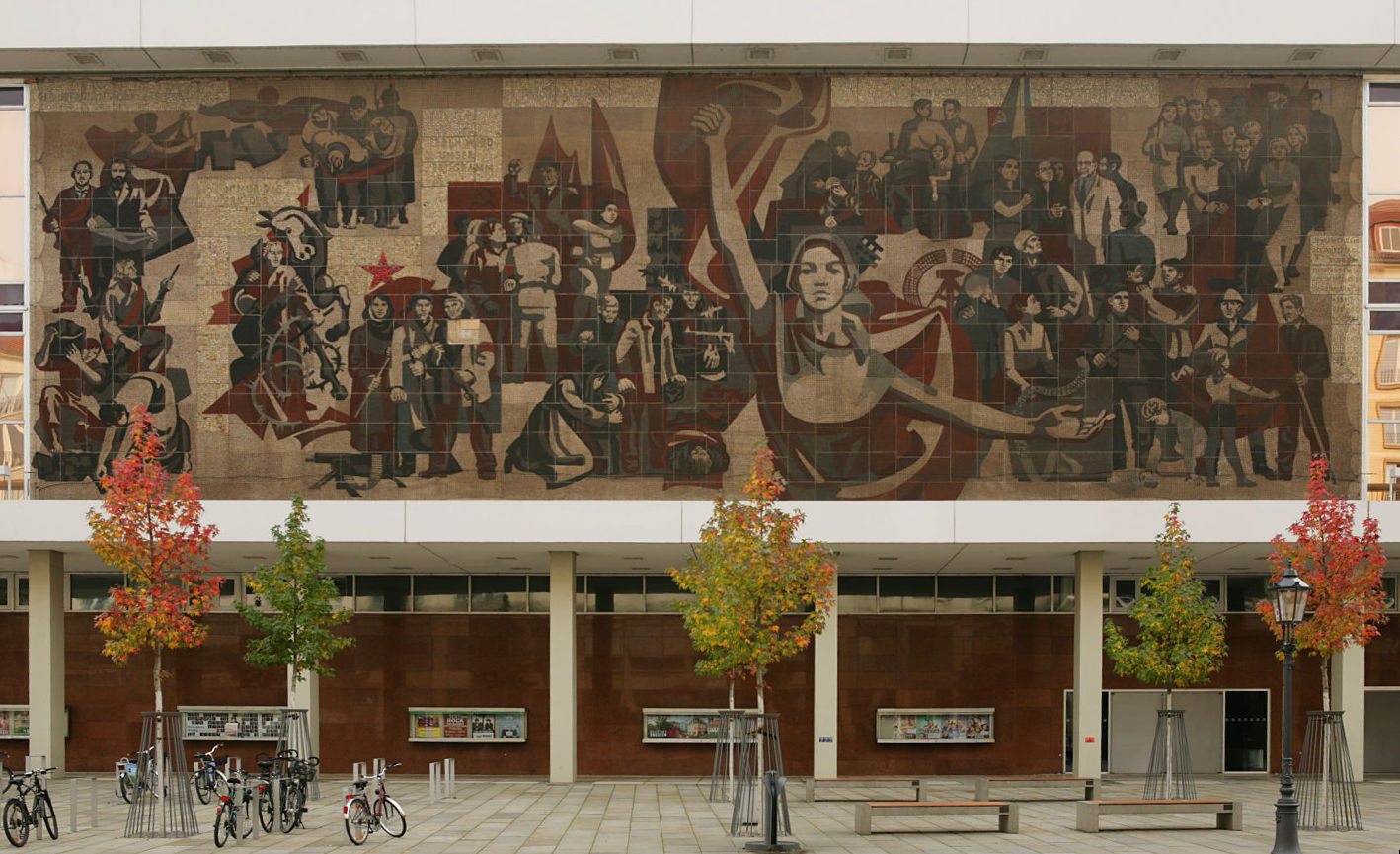 "Der Weg der Roten Fahne" am Dresdner Kulturpalast